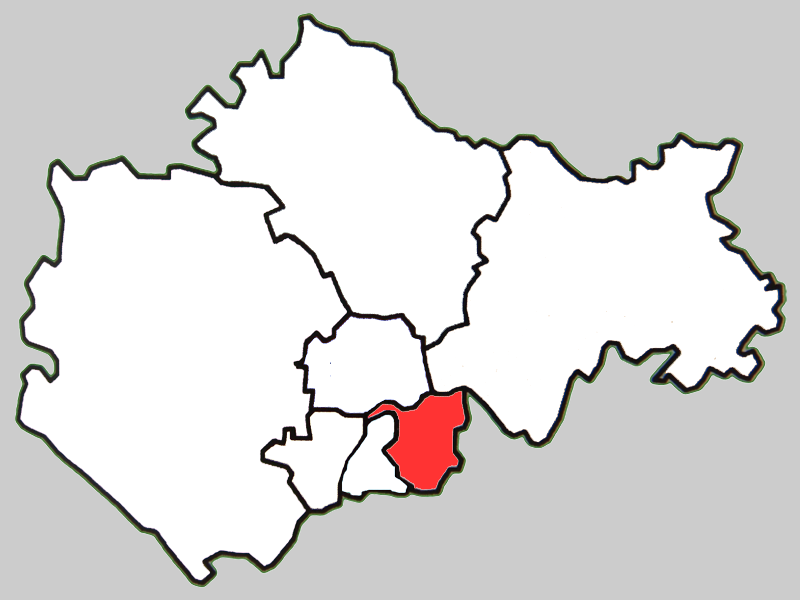 蚌埠市龙子湖区地图